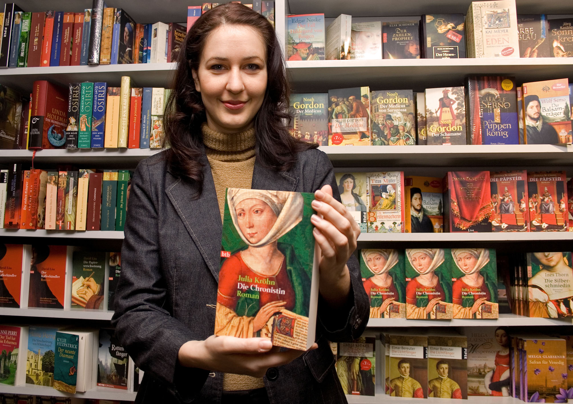 Julia Kröhn in einem Frankfurt Buchladen mit ihrem Buch "Die Chronistin"